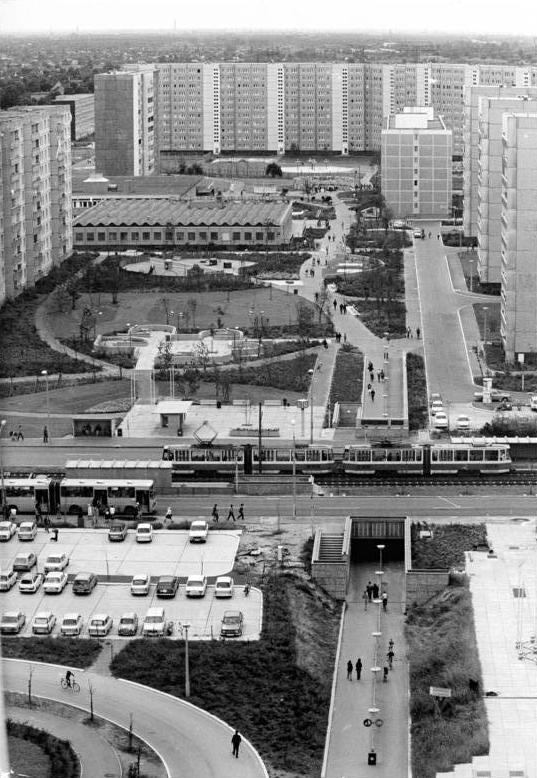 Berlin, Marzahn, Wohnblocks, Grünanlage ADN-ZB Schindler 4.9.81 Berlin-Marzahn-1.Wohngebiet-Hier ist wie anderswo in Vierteln unserer Stadt bereits das Alltagsleben eingezogen. Großzügige Verkehrslösungen gehören ebenso zu diesem Bild wie moderne Versorgungs- und Dienstleitungseinrichtungen sowie gepflegte Grünanlagen.